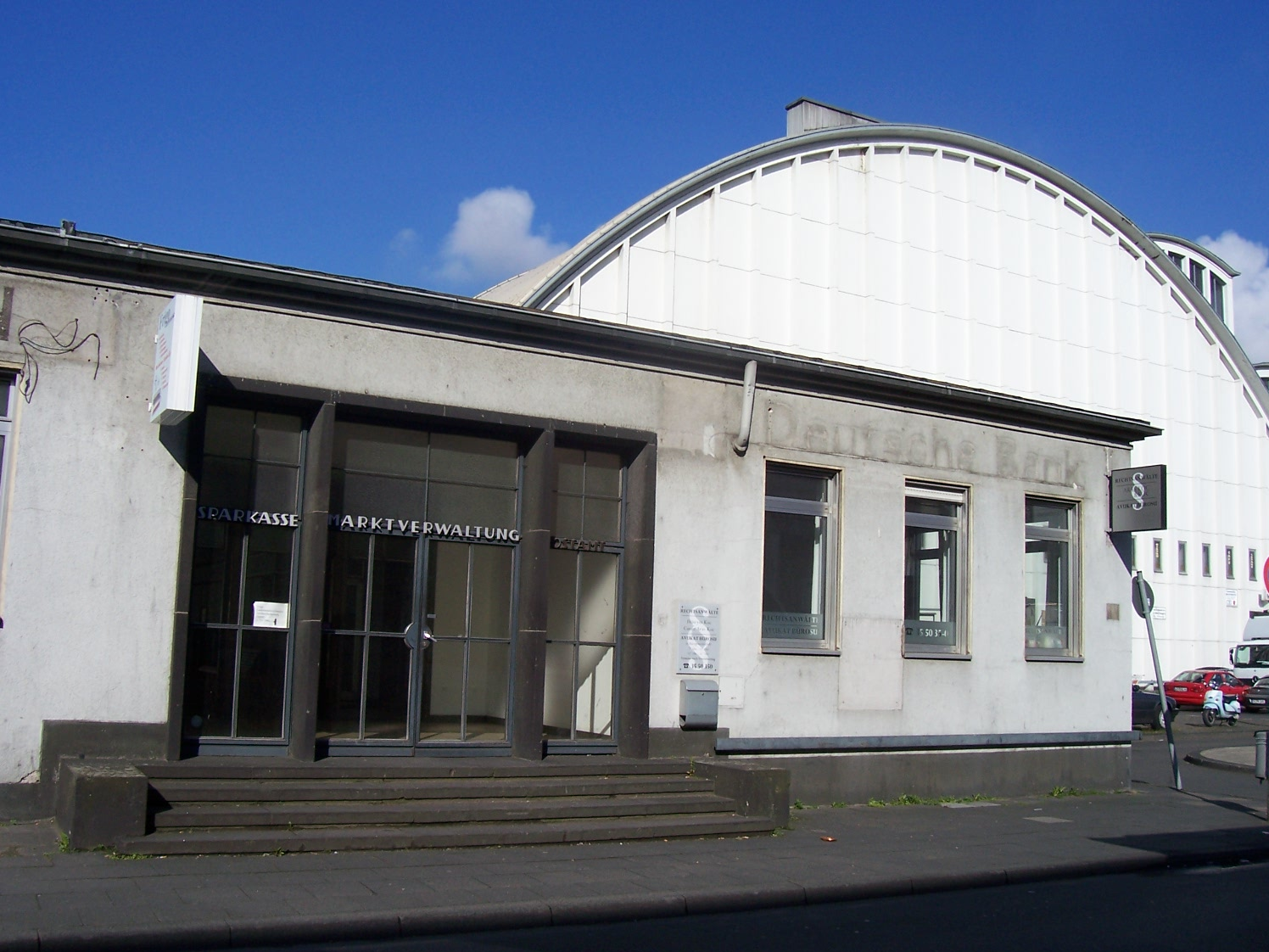 Marktverwaltung